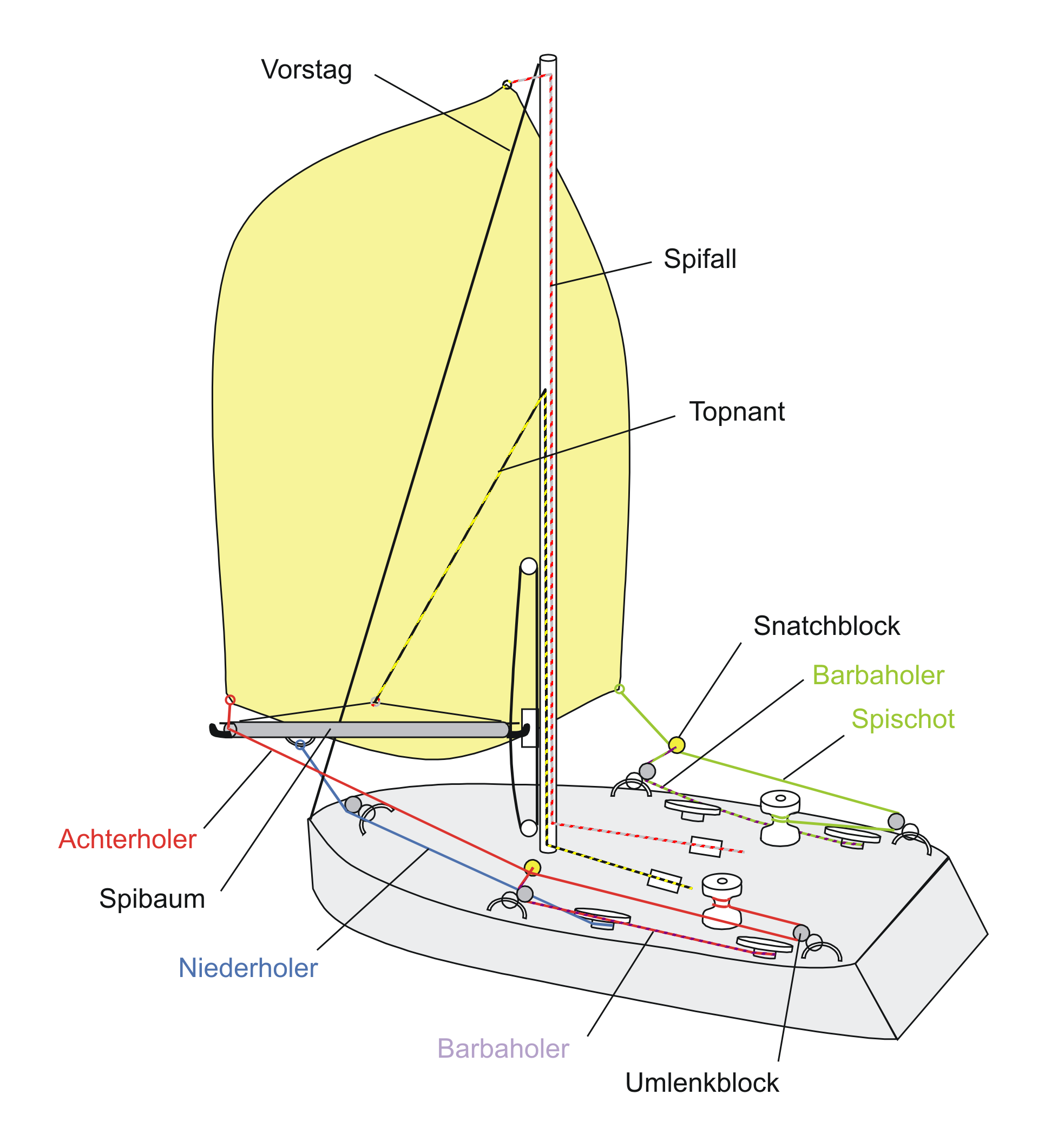 Spinnaker eines Segelboots und zugehörige Leinenführung